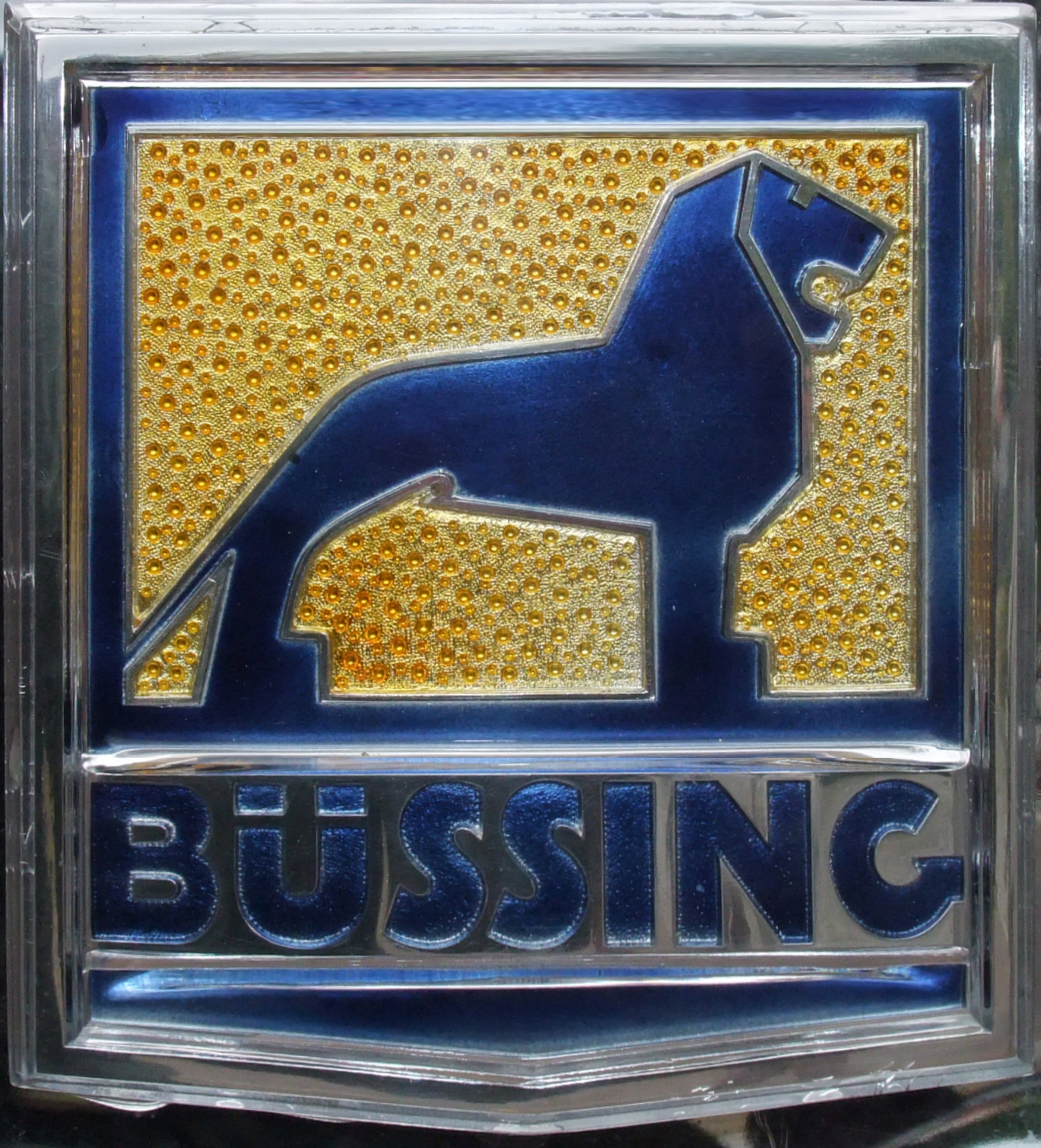 Büssing Logo auf dem Büssing D2U 64 Doppelstockbus, Wagennummer 1629. Indienststellung: 17. Mai 1965. Ende Linieneinsatz: 25. Mai 1976.